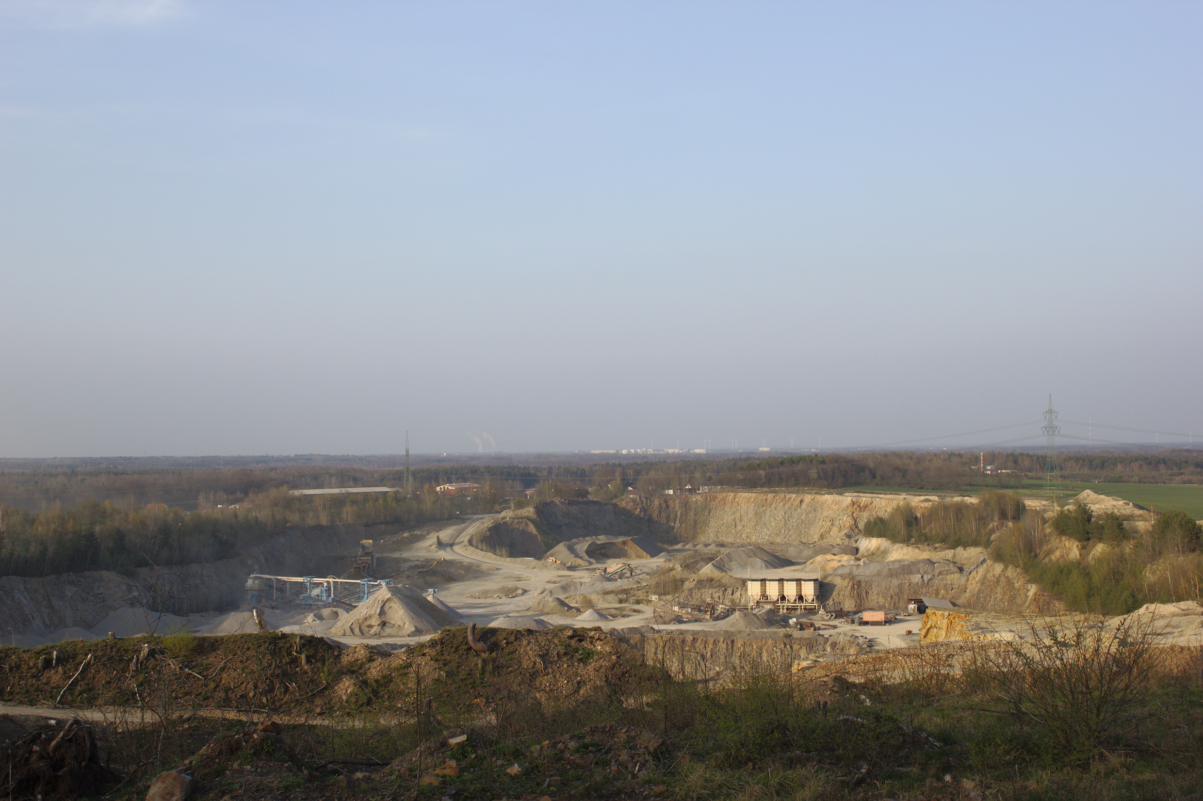 Hornjoserbsce: Šěrawcowa jama pola Wóslinka.